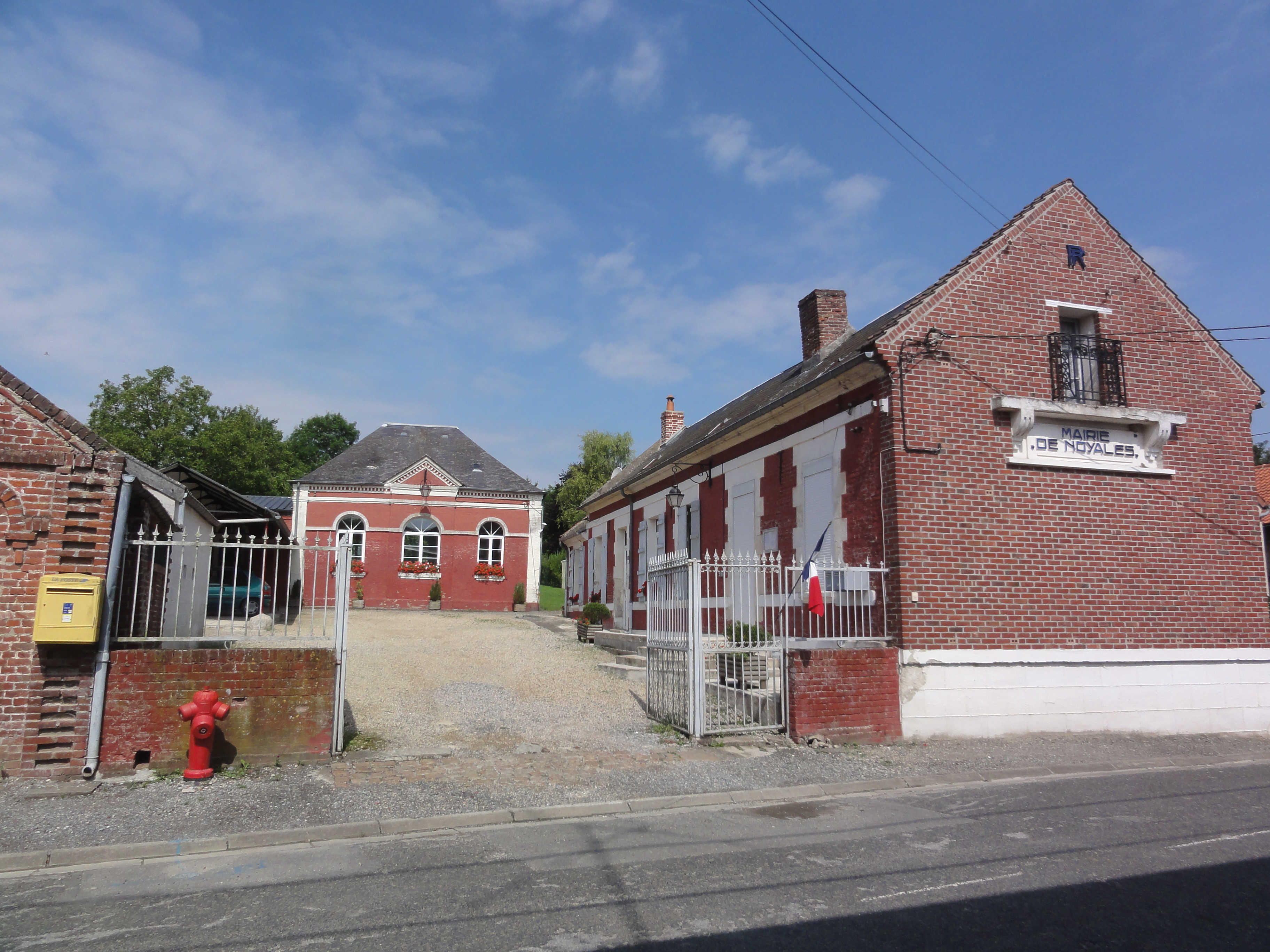 Noyales (Aisne) mairie